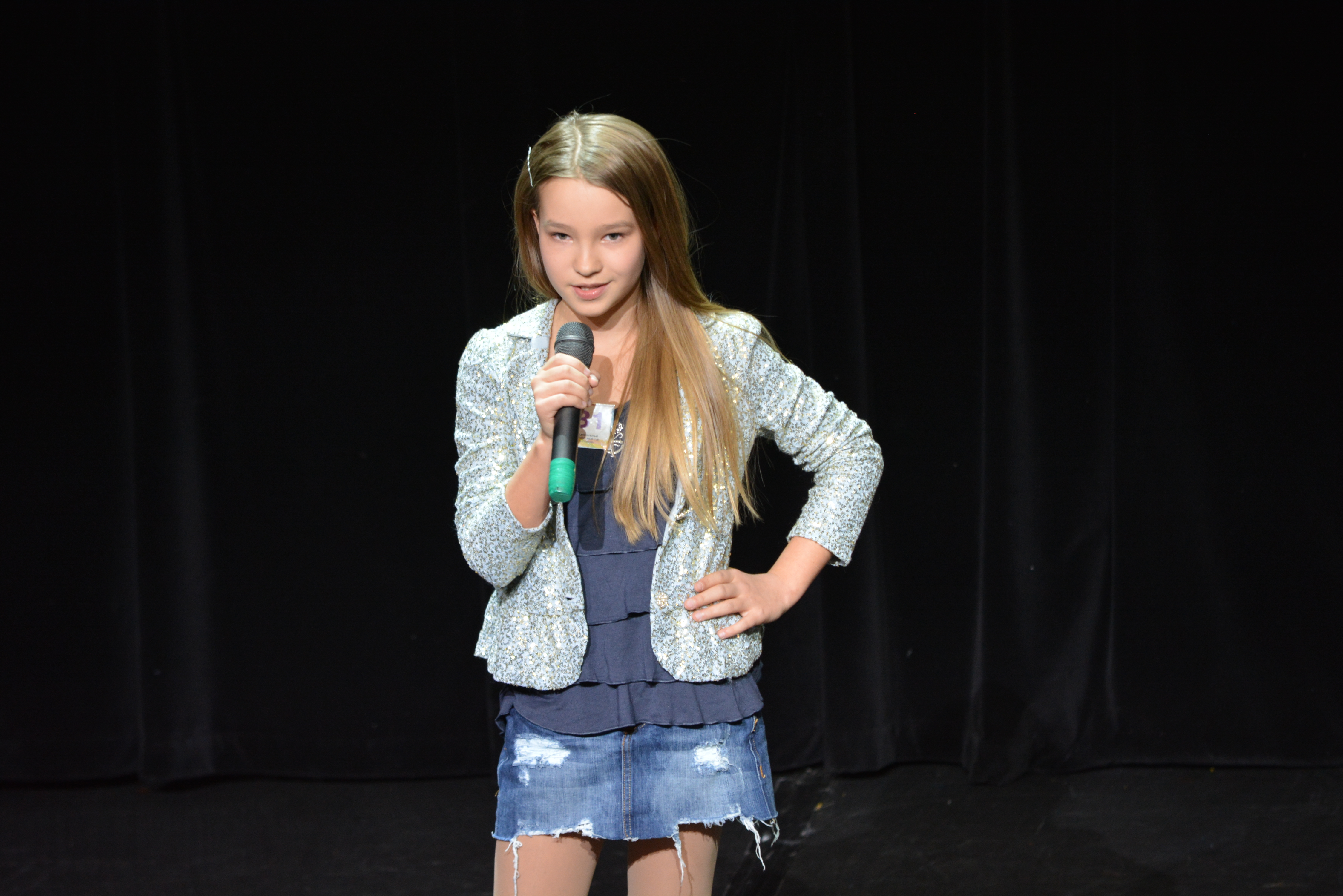 Даяна Кириллова на российском отборочном туре музыкального конкурса «Детская Новая Волна 2014» (5 апреля 2014 года, Бородино-Холл, г. Москва)